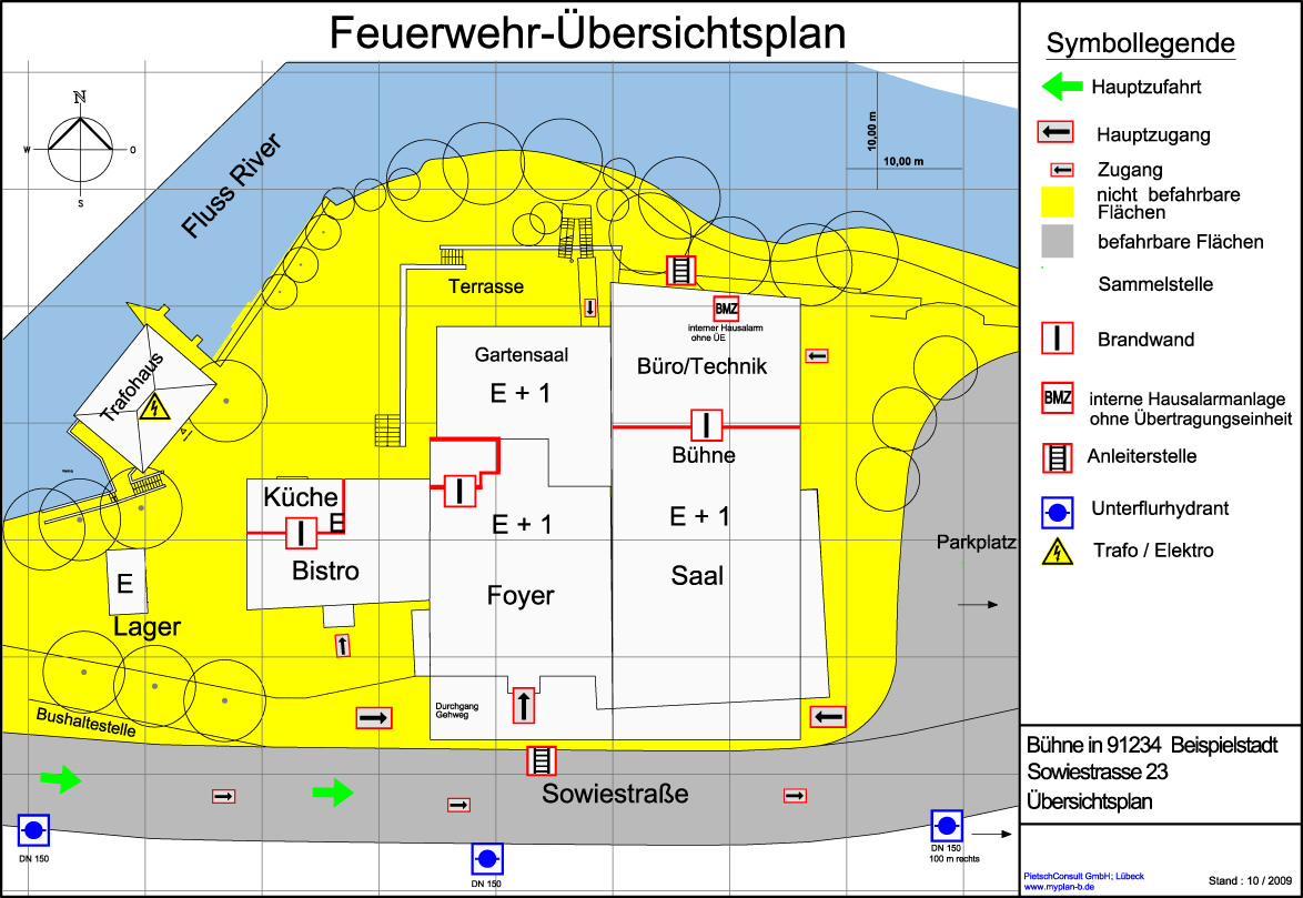 Muster eines Feuerwehreinsatzplanes (Übersichrtplan)